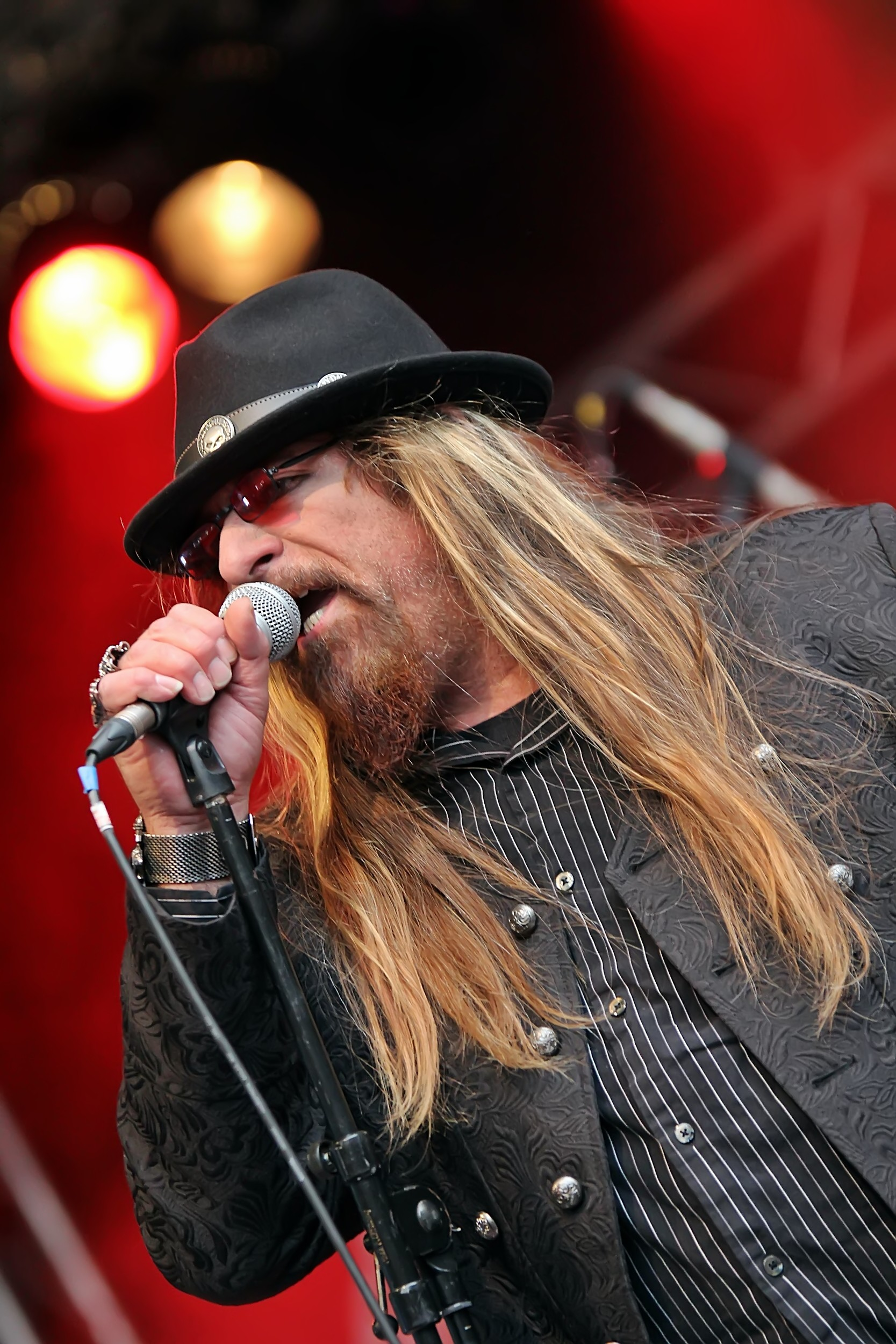 Doug Lee (voc) mit SIREN beim Keep It True Festival 2018